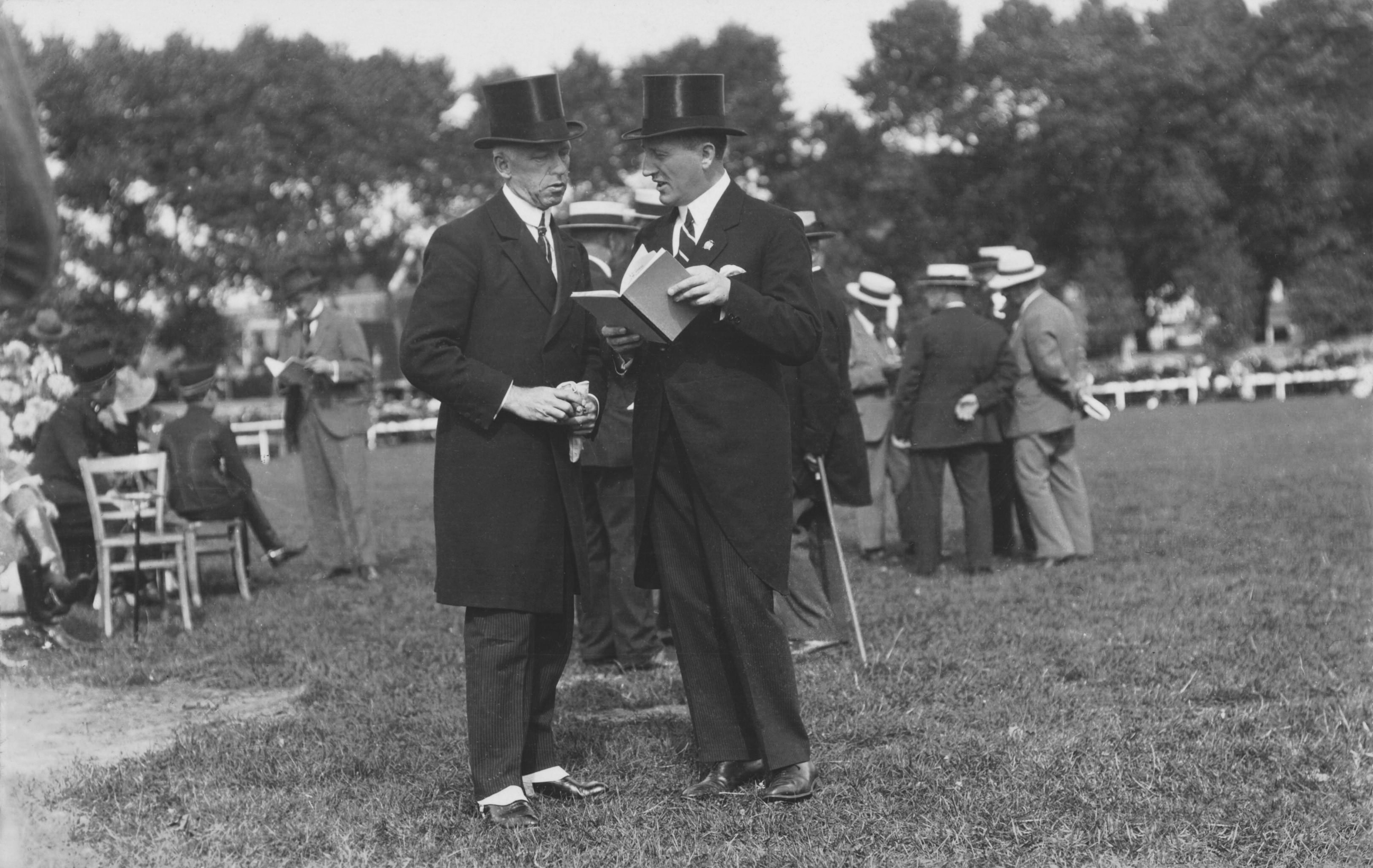 Commissaris der Koningin in Drenthe, J.T. Linthorst Homan (links) en de voorzitter van de Harddraverij Vereniging (augustus 1924)